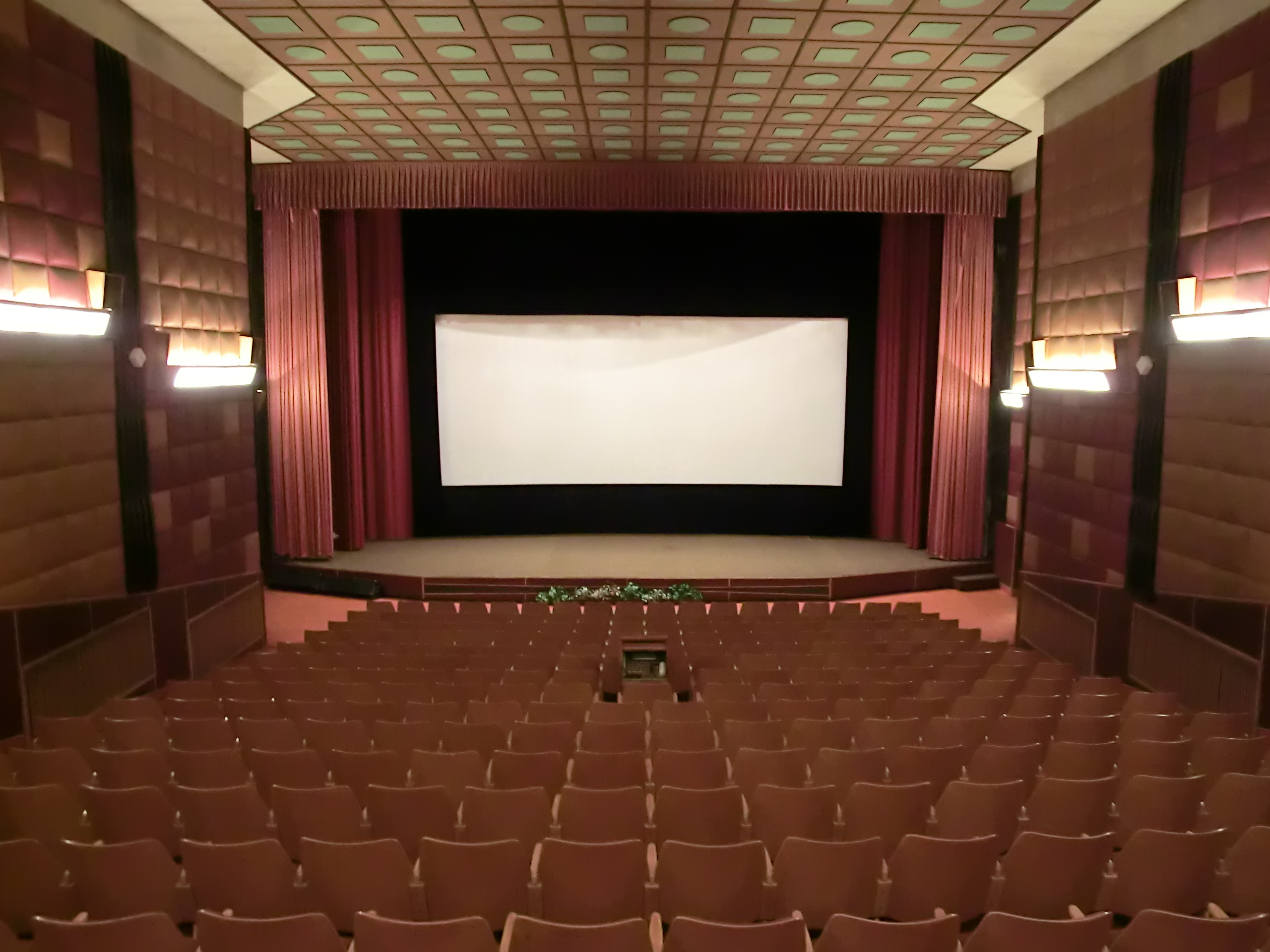 Kino 70 Jilemnice - plátno při projekci 1:2,35 (širokoúhlý)